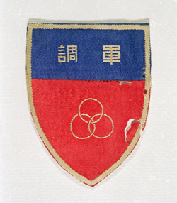 北平军事调处执行部臂章